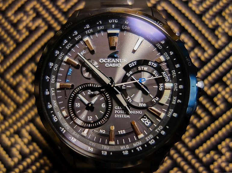 GPSハイブリッド電波ソーラー腕時計 （CASIO OCEANUS OCW-G1000B-1AJF）